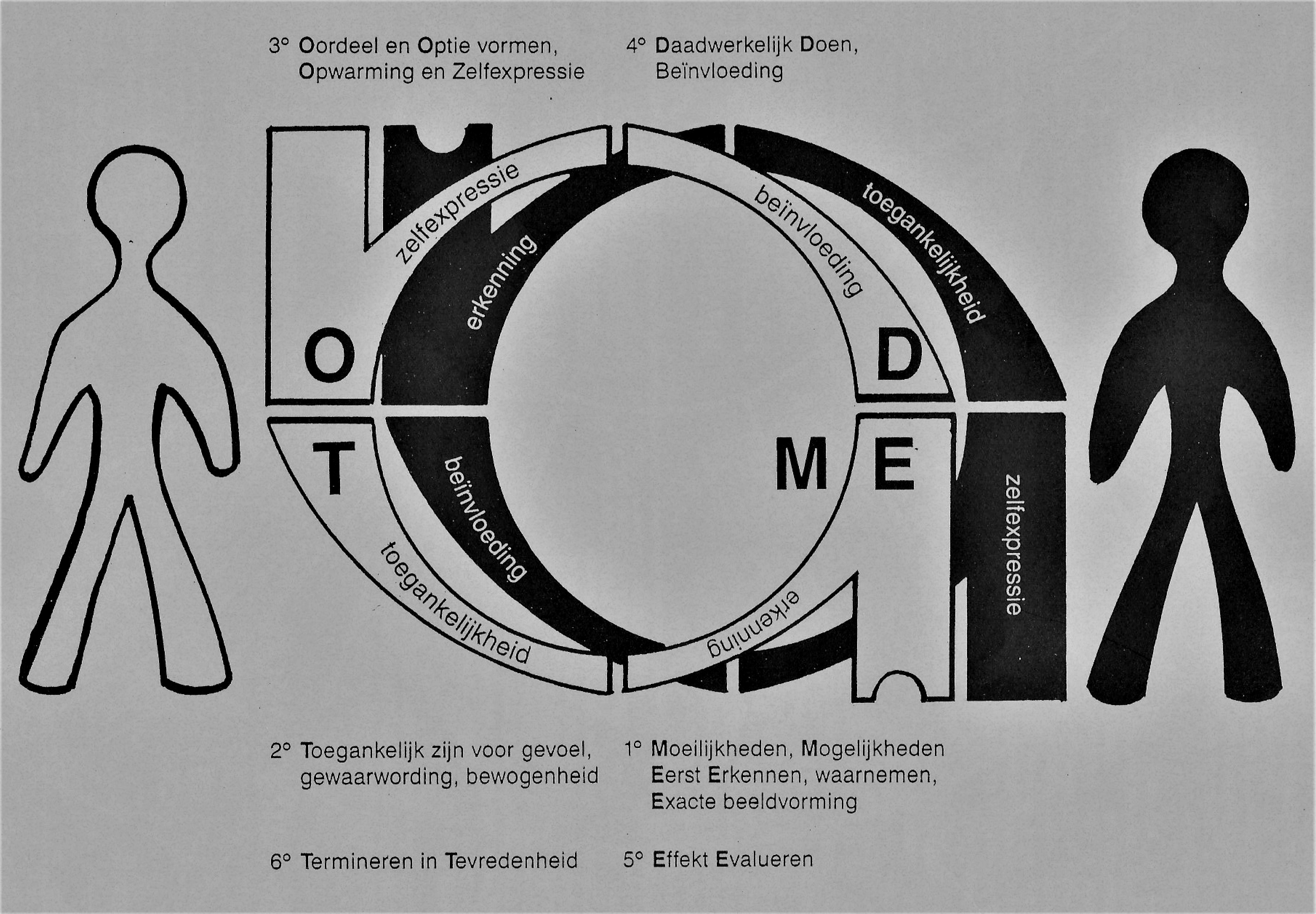 De bejegeningskringloop schetst een overzicht van de verschillende vermogens die in het contact met onszelf en de buitenwereld een functie hebben: de waarneming, de gewaarwording, het denken en het gedrag.